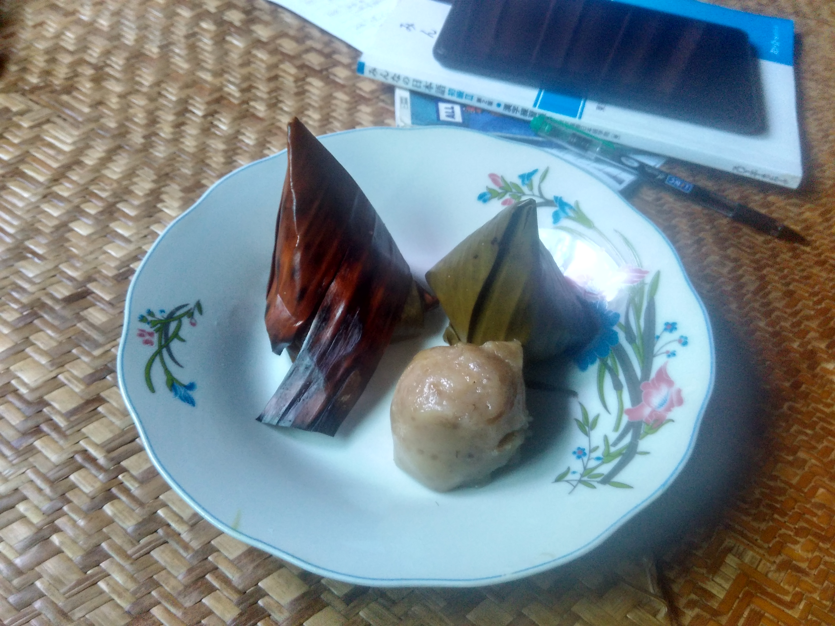 မုန့်ဖက်ထုပ်